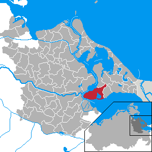 Usedom, Landkreis Ostvorpommern, Mecklenburg-Vorpommern